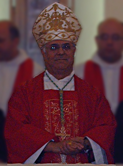 Mons. Vincenzo Bertolone, vescovo della Diocesi di Cassano allo Ionio (Cosenza, Italia).